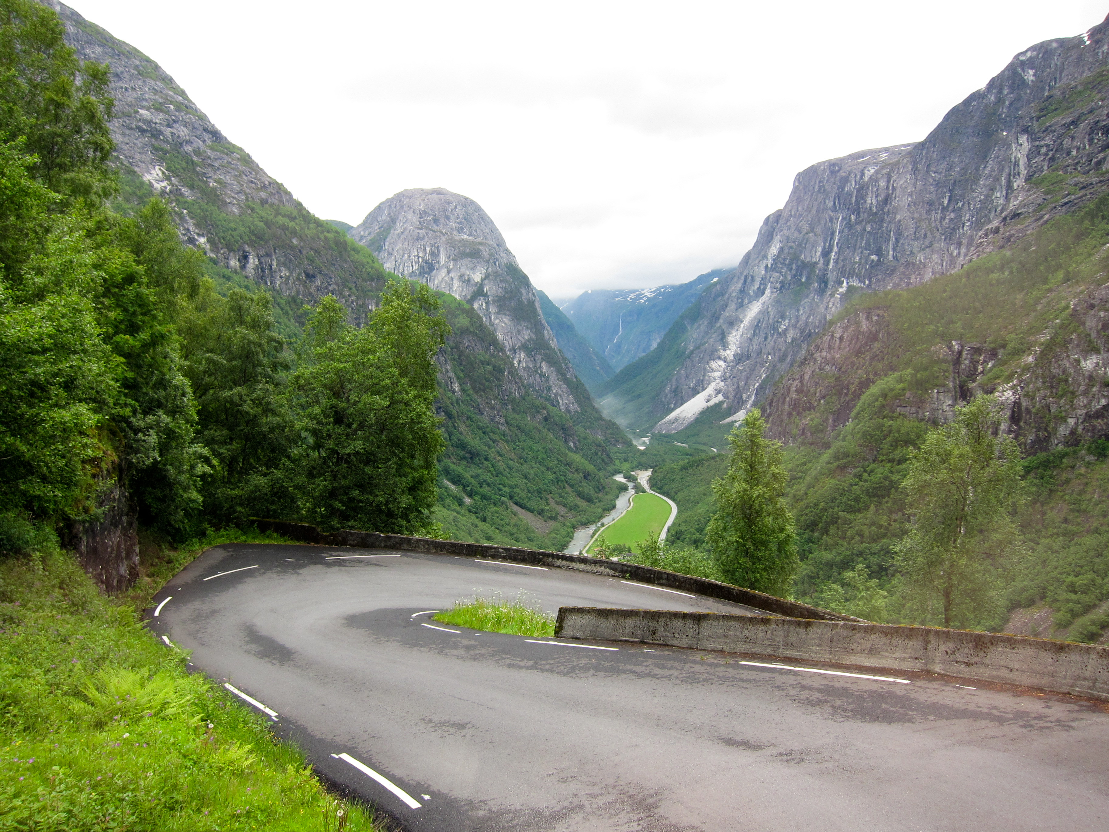 Steep road. Stalheimskleiva, Voss, Norway.